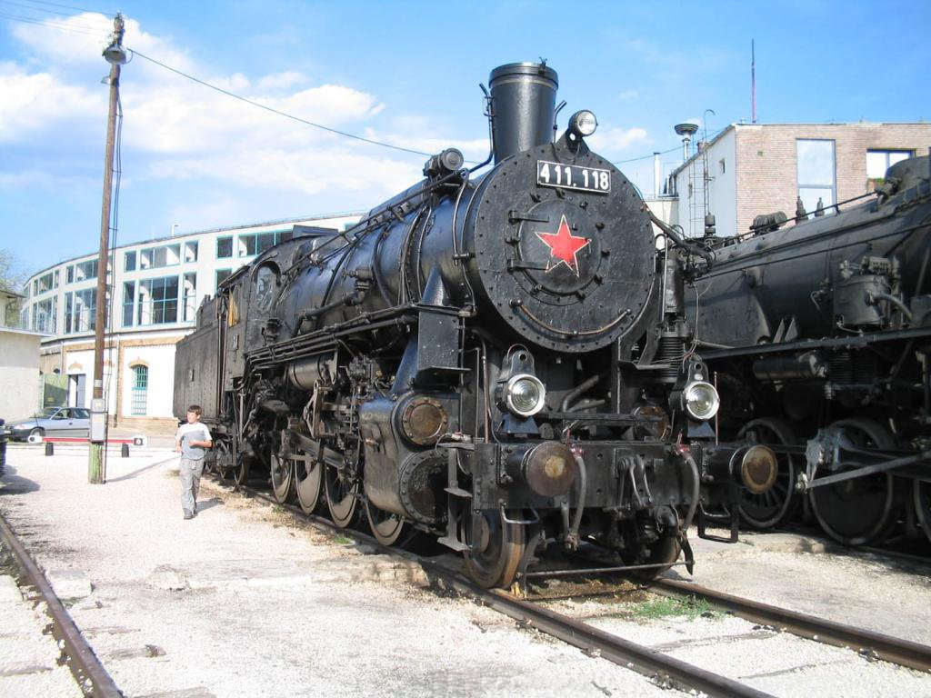 MÁV 411,118 a Magyar Vasúttörténeti Parkban